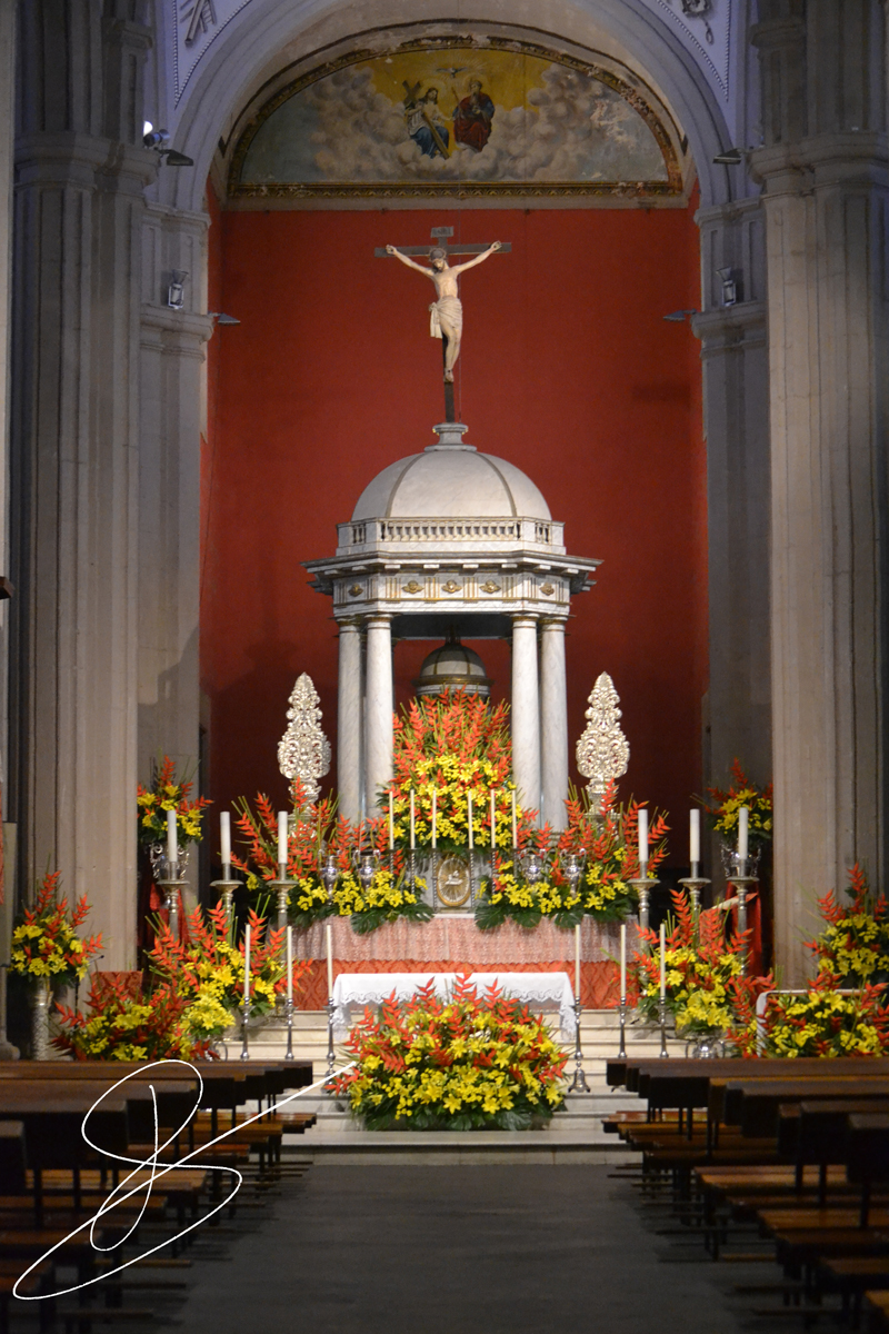 Tabernáculo del Templo Matriz de Santiago de los Caballeros de Gáldar